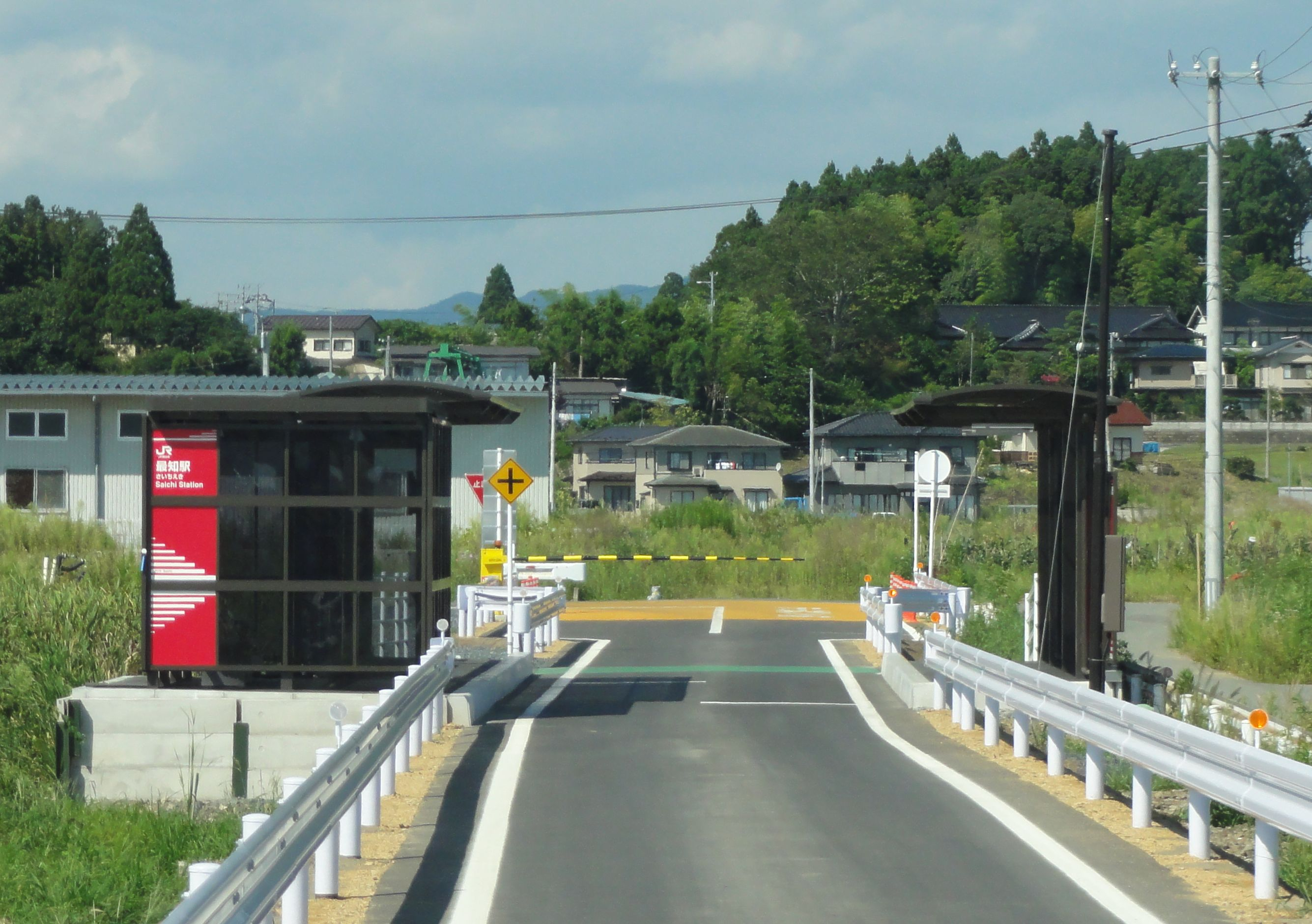 最知駅 代行バス・バス停